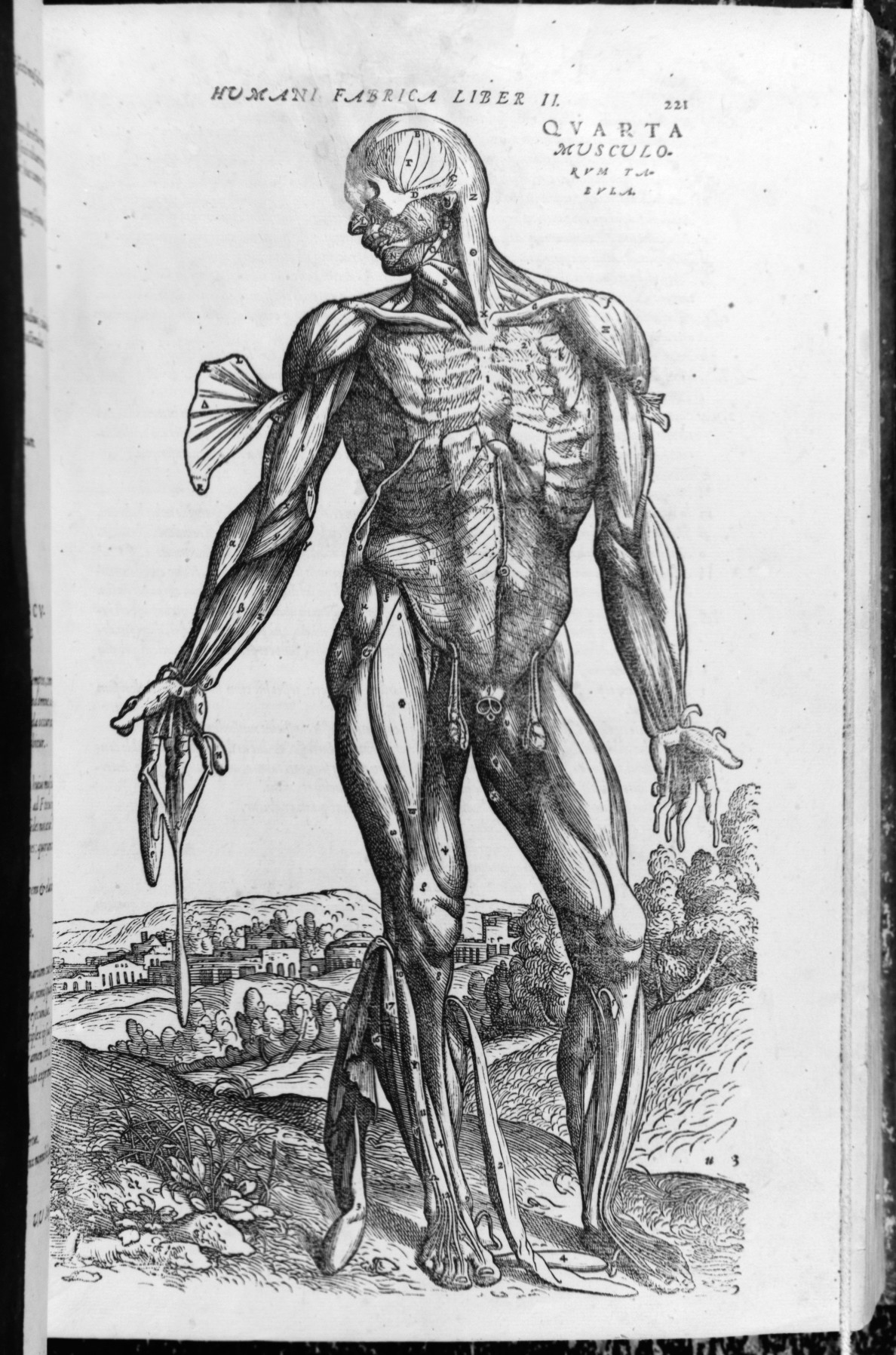 Book; Books